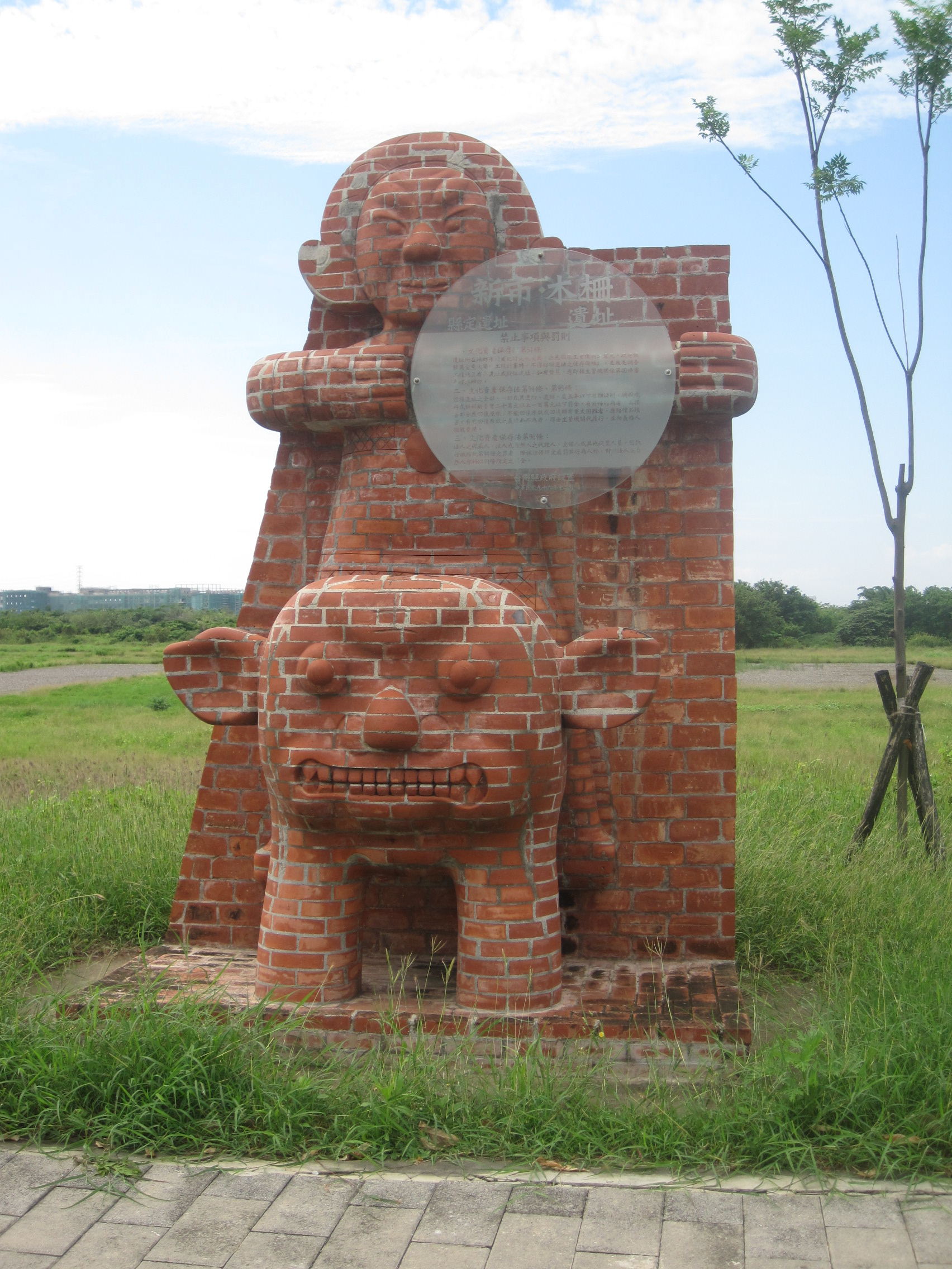 新市·木柵遺址意象